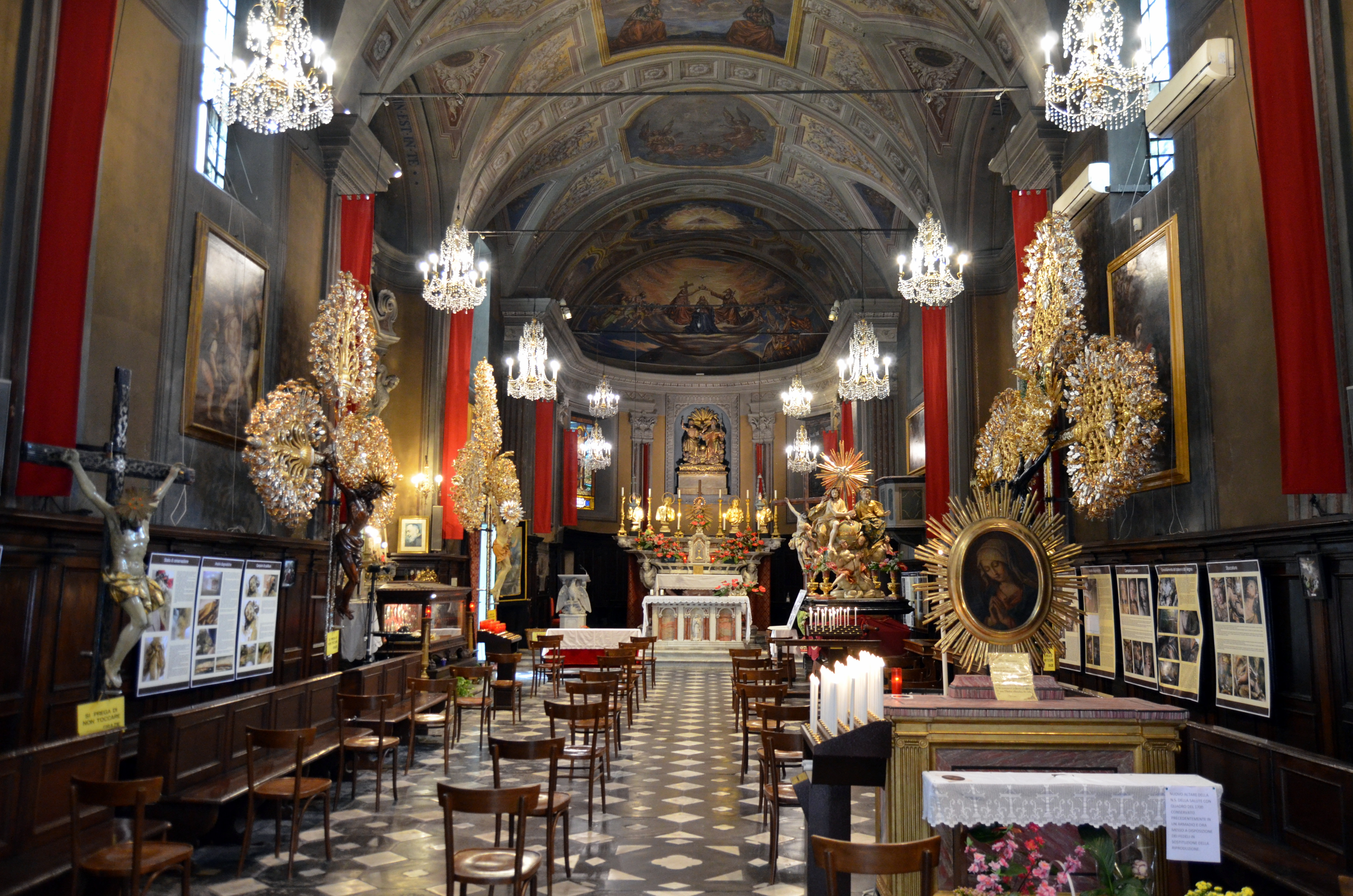 Oratorio della Santissima Trinità, Lavagna, Liguria, Italia